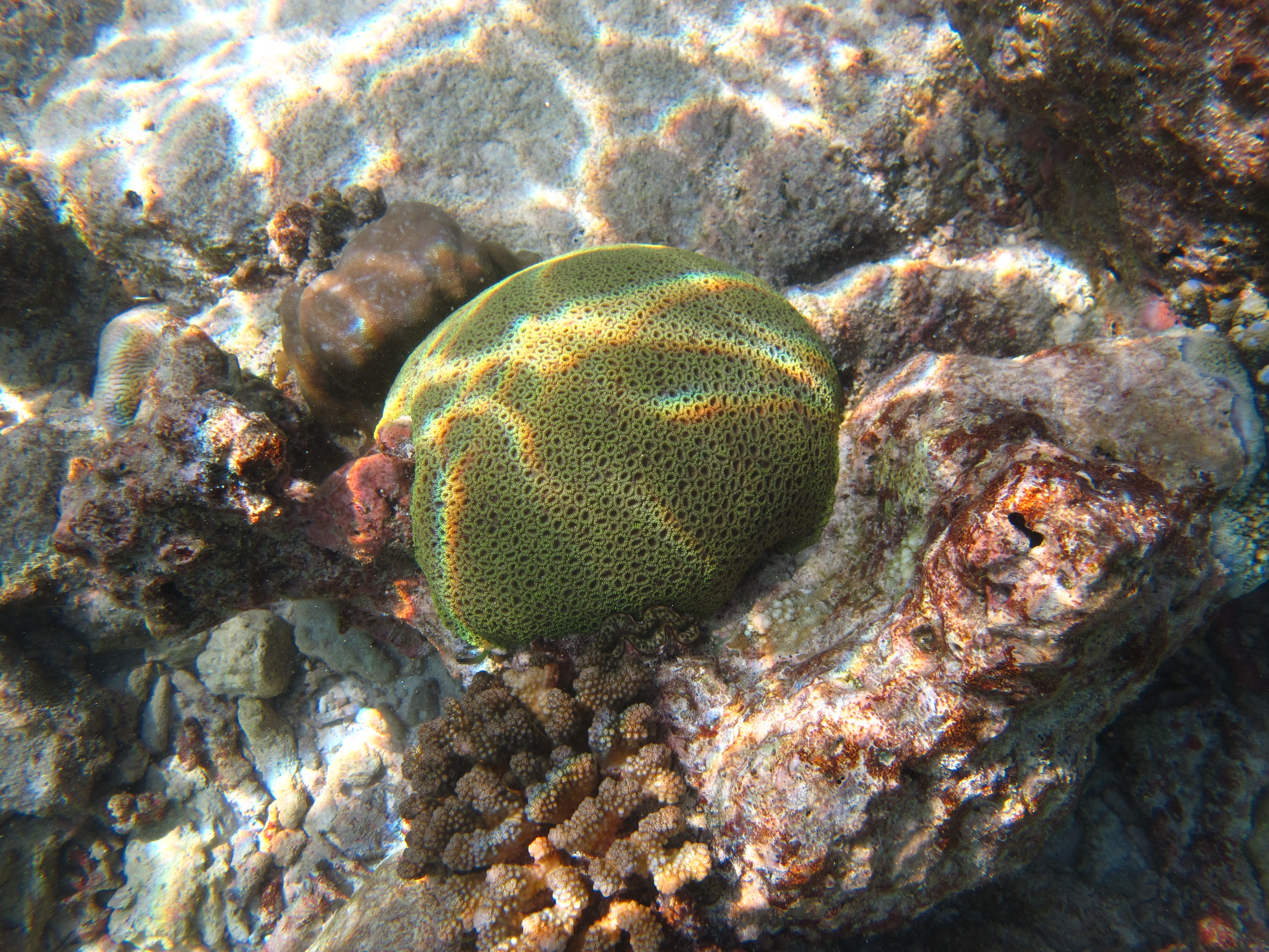 Une colonie de corail Plesiastrea versipora aux Maldives (atoll de Baa).